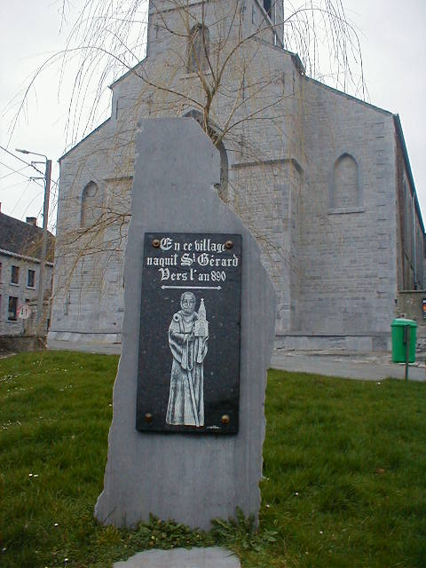 Walon: Plake al memwere do skepiaedje di Sint Djuråd a Ståve